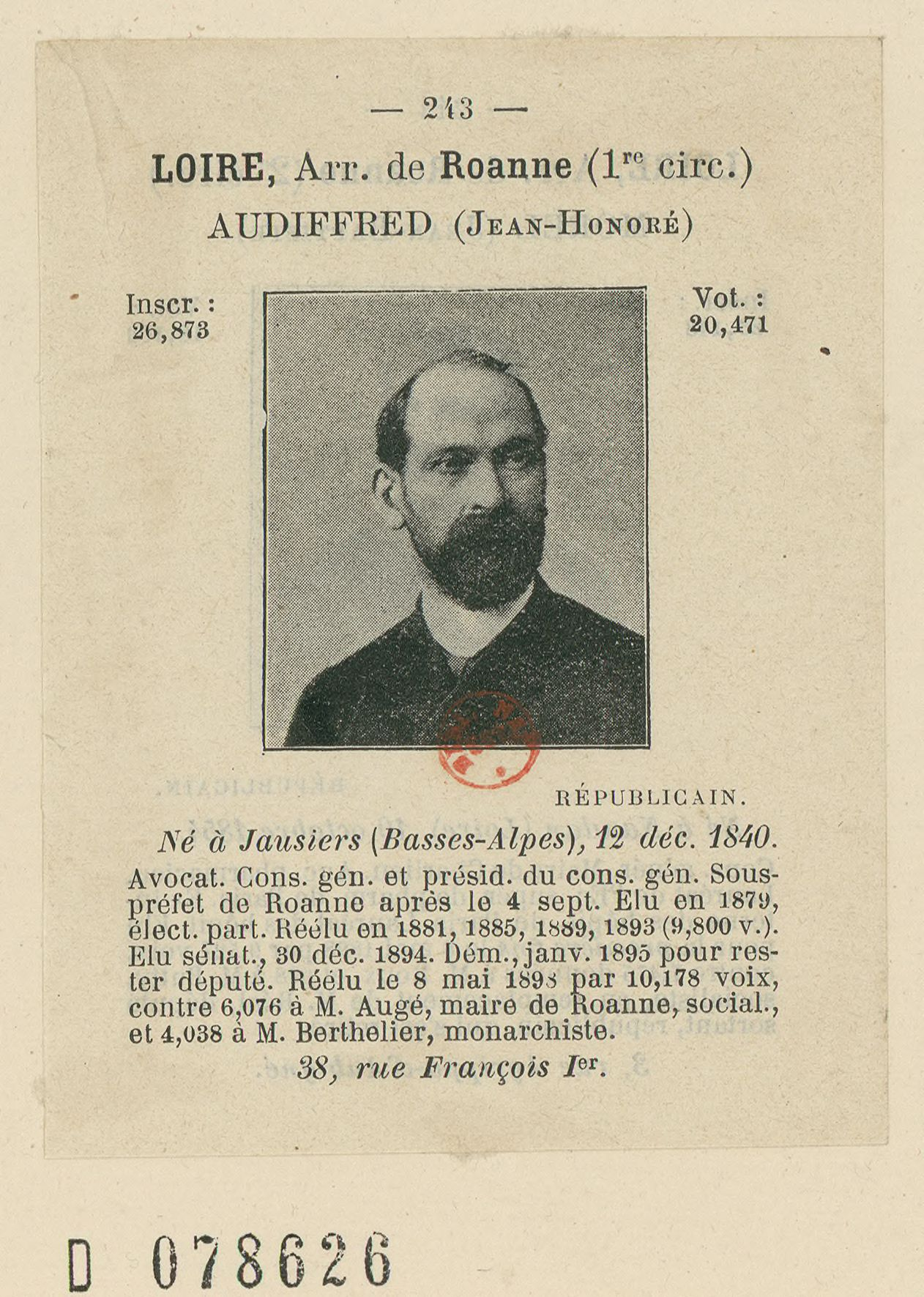 Jean-Honoré Audiffred (1840-1917), député et sénateur.